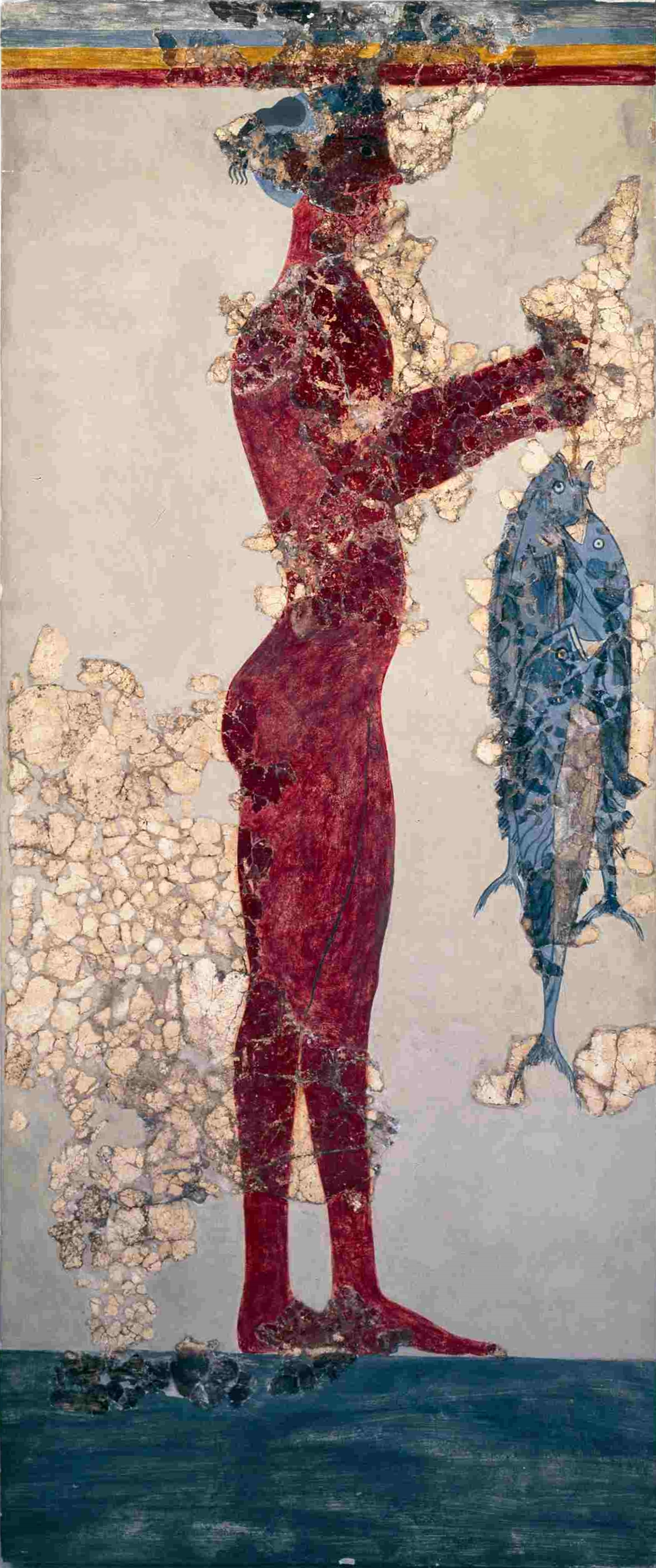 Darstellung eines Adoranten mit Fischen auf einem Fresko aus Raum 5 im Obergeschoss des Westhauses der Ausgrabungsstätte in Akrotiri auf Santorin, Kykladen, Griechenland